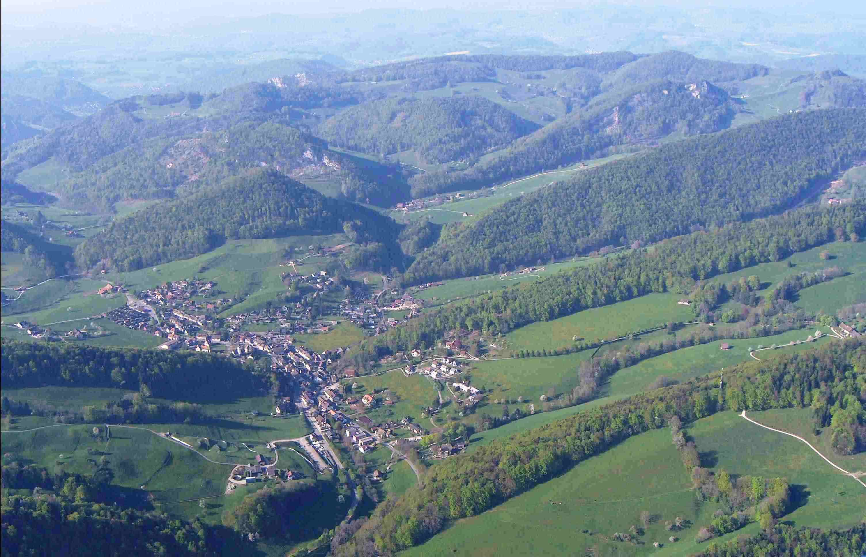 mit dem Gleitschirm aus ca. 1500 MüM